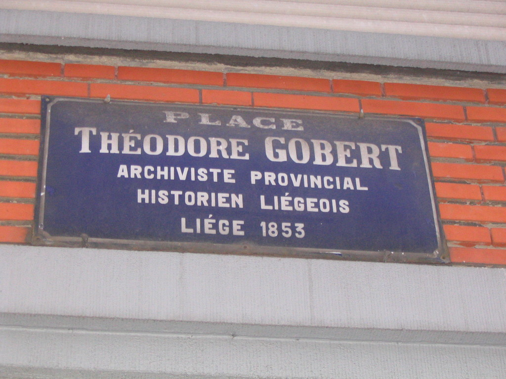 plaque 'Place Théodore Gobert' à 4020 Liège